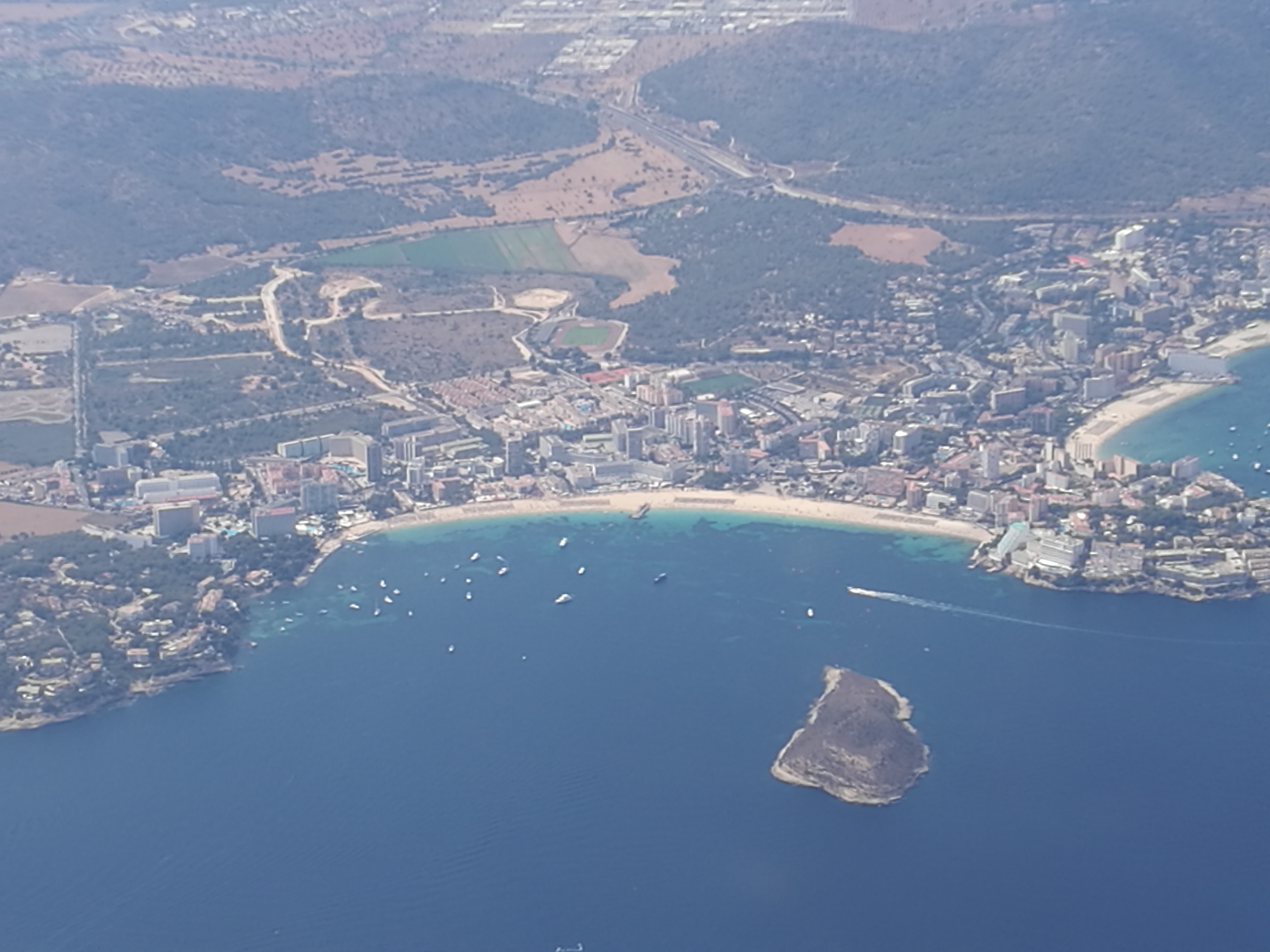 Plage de Palmanova, à Magaluff.